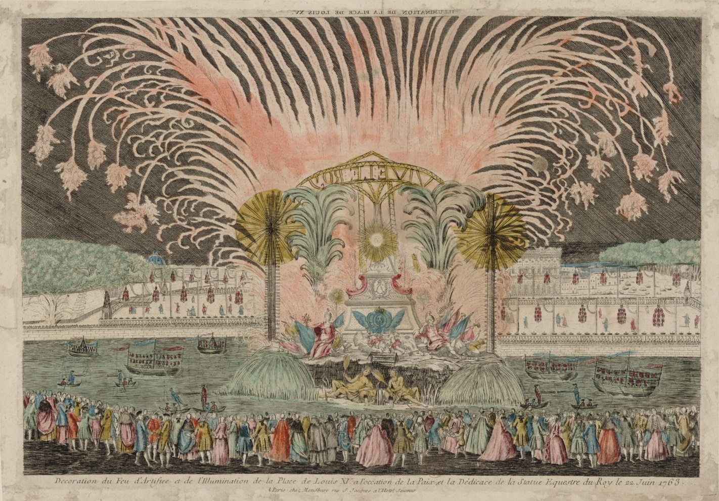 Décoration du feu d'artifice et de l'illumination de la place de Louis XV, à l'occasion de la paix, et la dédicace de la statue équestre du Roy le 22 juin 1763. A Paris chez Mondhare, rue S. Jacques à l'hotel Saumur